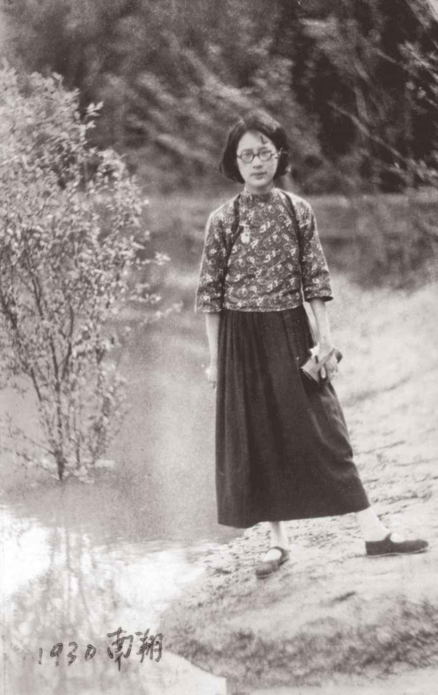 张允和（1909年7月25日－2002年8月14日），出生于安徽合肥的苏州世家，近代学者。此图1930年，张允和在上海南翔。